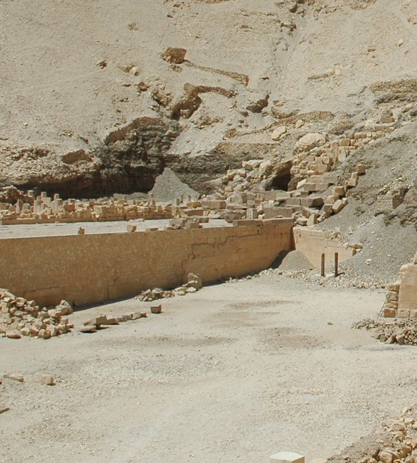 Vorne Rampe des Totentempel des Mentuhotep II und dahinter Überreste der Hatorkapelle des Totentempel des Thutmosis III. in Deir el-Bahari